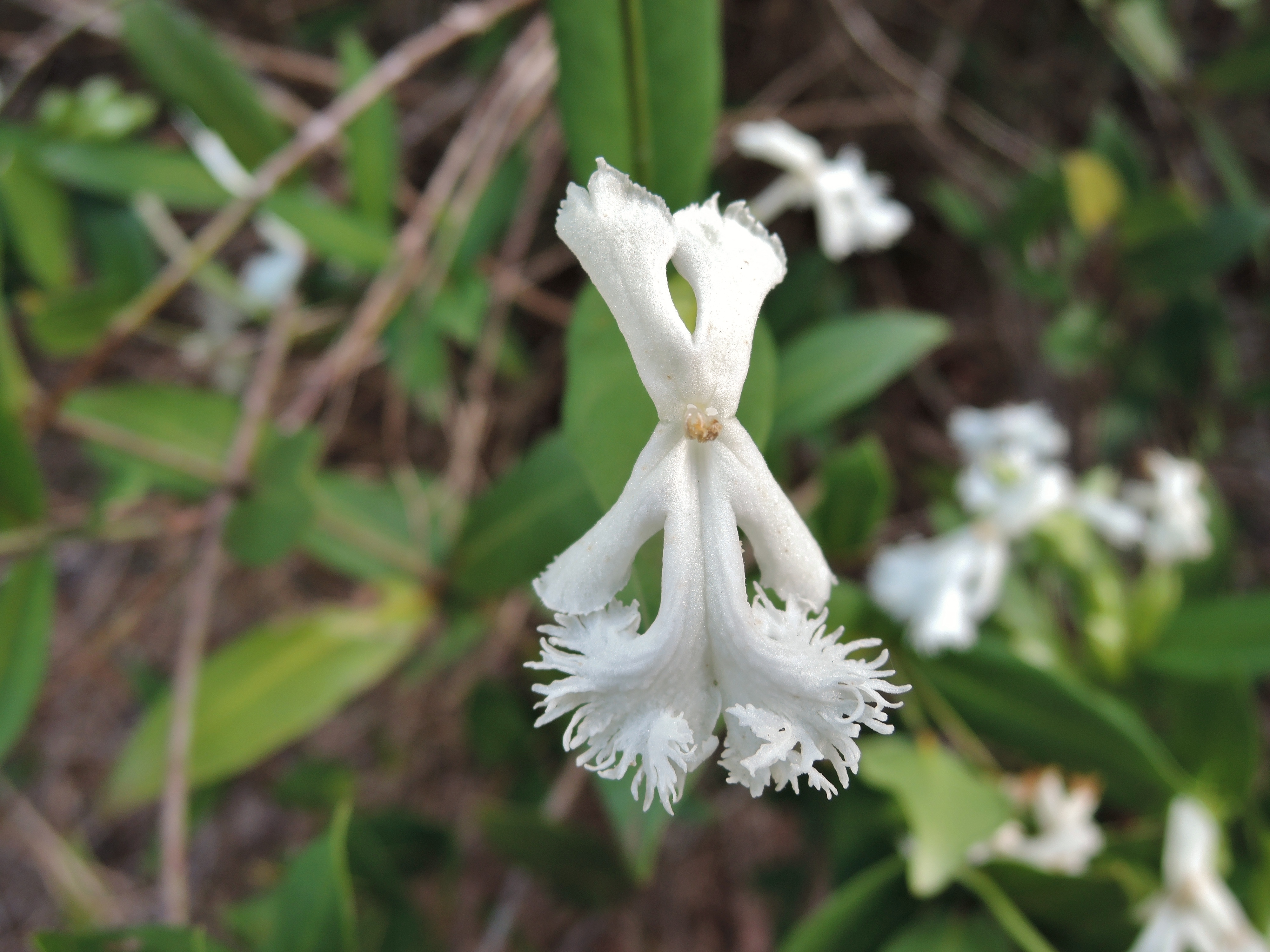 Fleur du "oxera nerrifolia"